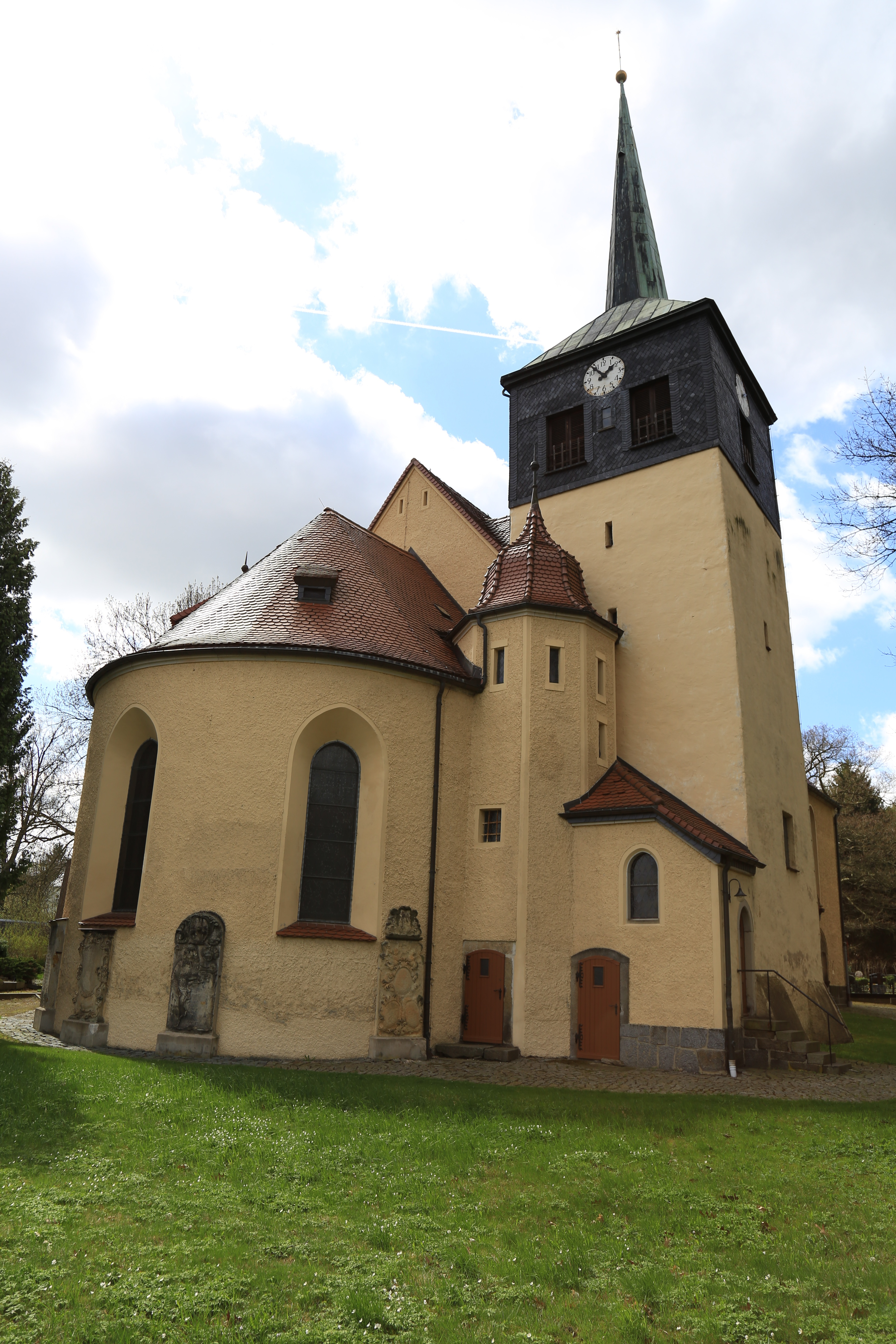 Dorfkirche Spremberg April 2017 (1)